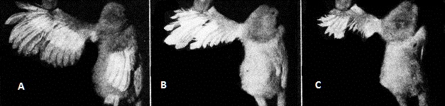 Tipos de emplume a los diez días